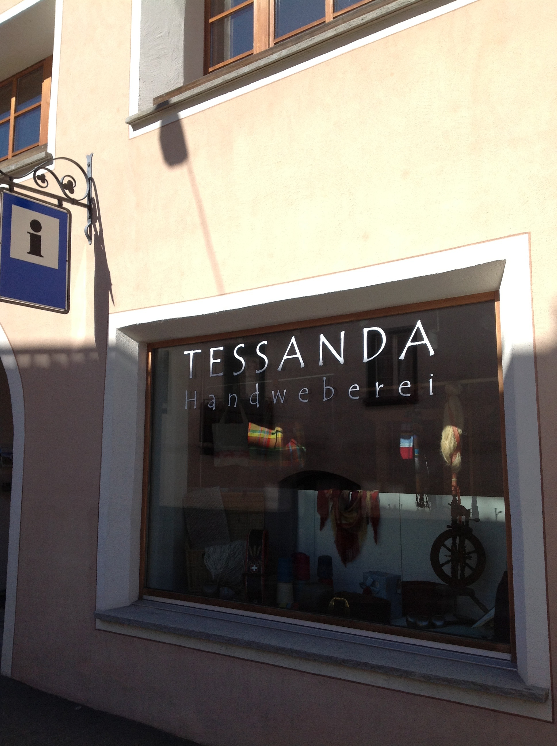 Die Tessanda in Santa Maria im Val Müstair